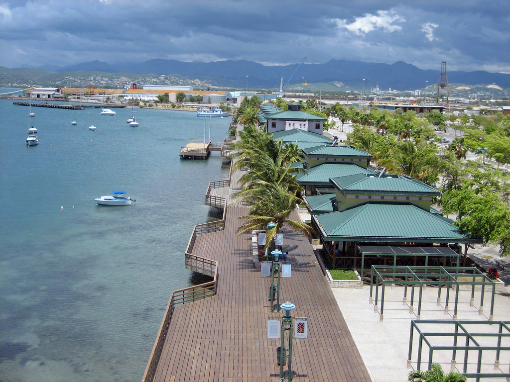 Area recreativa de La Guancha, Playa de Ponce, Puerto Rico.